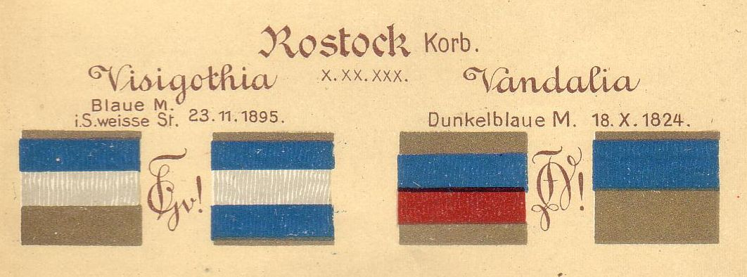 Couleur der Rostocker Corps Vandalia und Visigothia